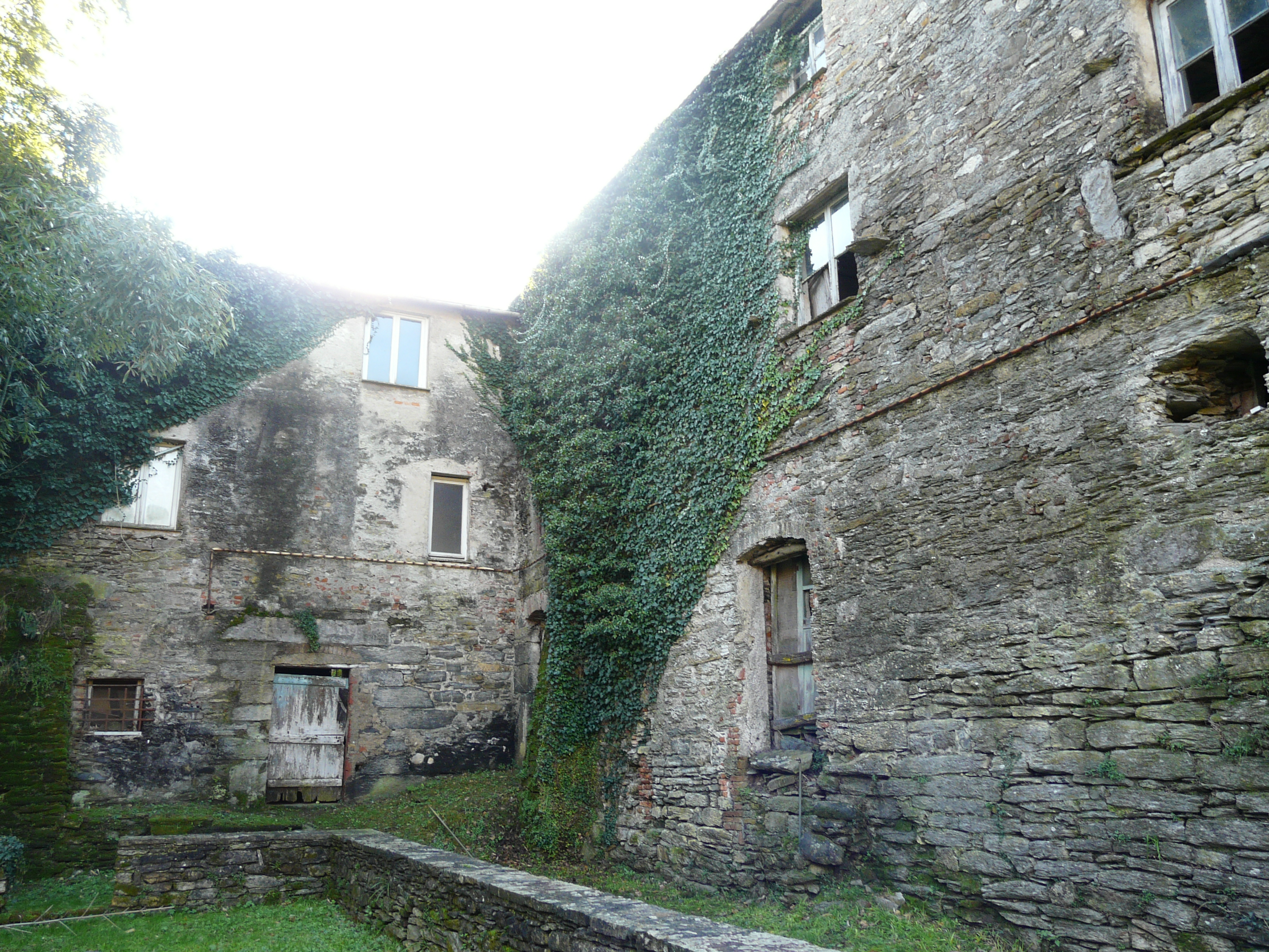 Ruderi dell'antico complesso monastico di Valle Christi del XIII secolo presso Rapallo, Liguria, Italia